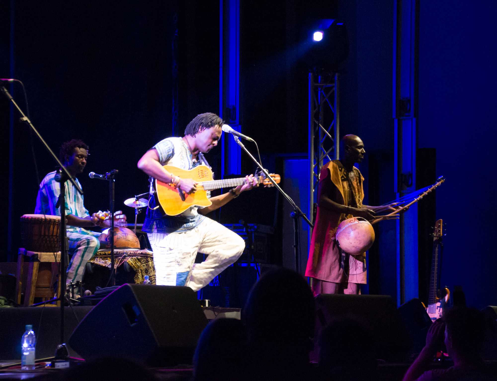 Habib Koité & Band 2014 in Detmold